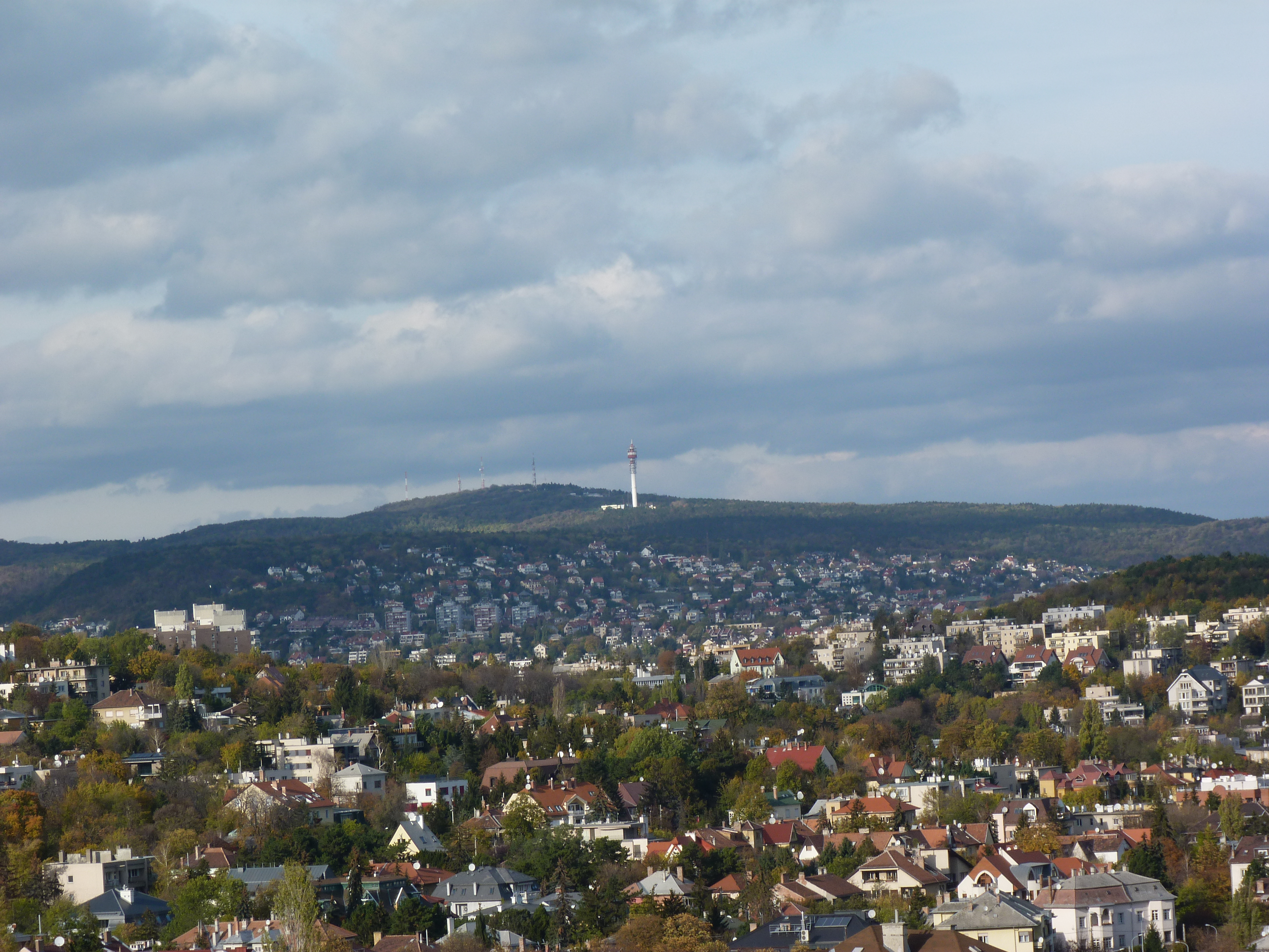 A felvétel 2012. november 4 -én készült. A Hármashatár hegy a Sashegyről.